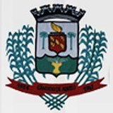 Brasão Cândido de Abreu